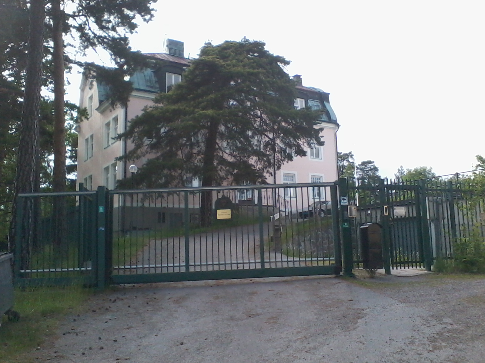 Kubas ambassad i Danderyd, Sturevägen 9, tidigare "Villa Skoga" och Stocksunds kommunalhus